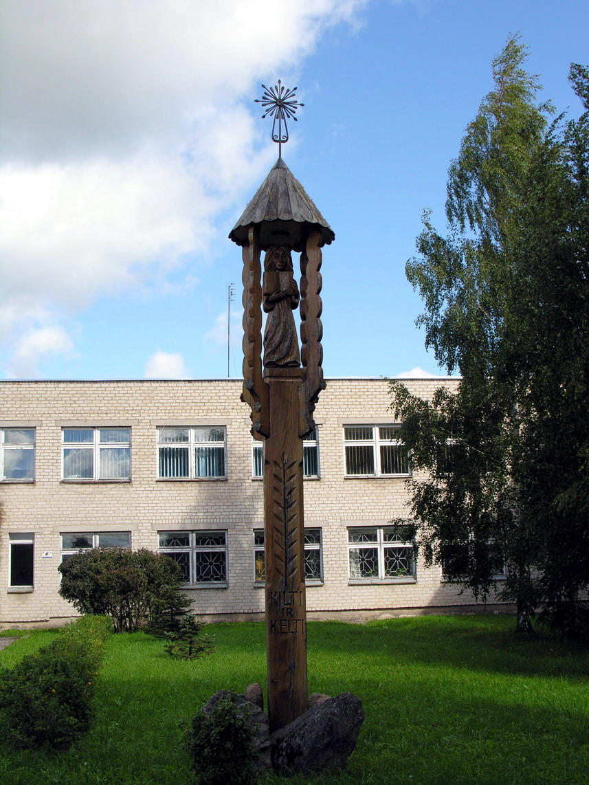 Židikų Marijos Pečkauskaitės vidurinė mokykla Stogastulpis su užrašu „Kilti ir Kelti" mokyklos kieme Foto: Algirdas, 2006 m. rugsėjo 9 d., Lietuva